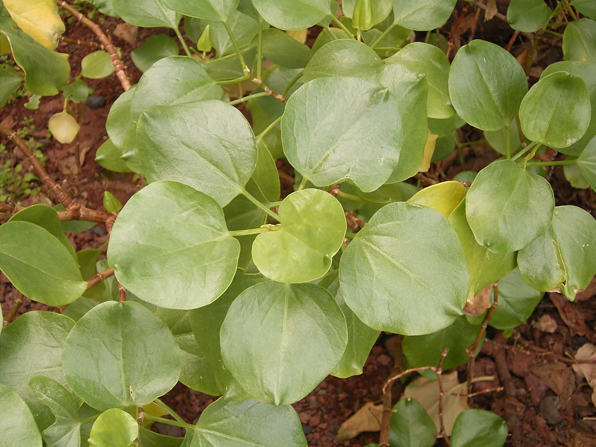 Rumex lunaria growing in Puntallana, La Palma, Canary Islands